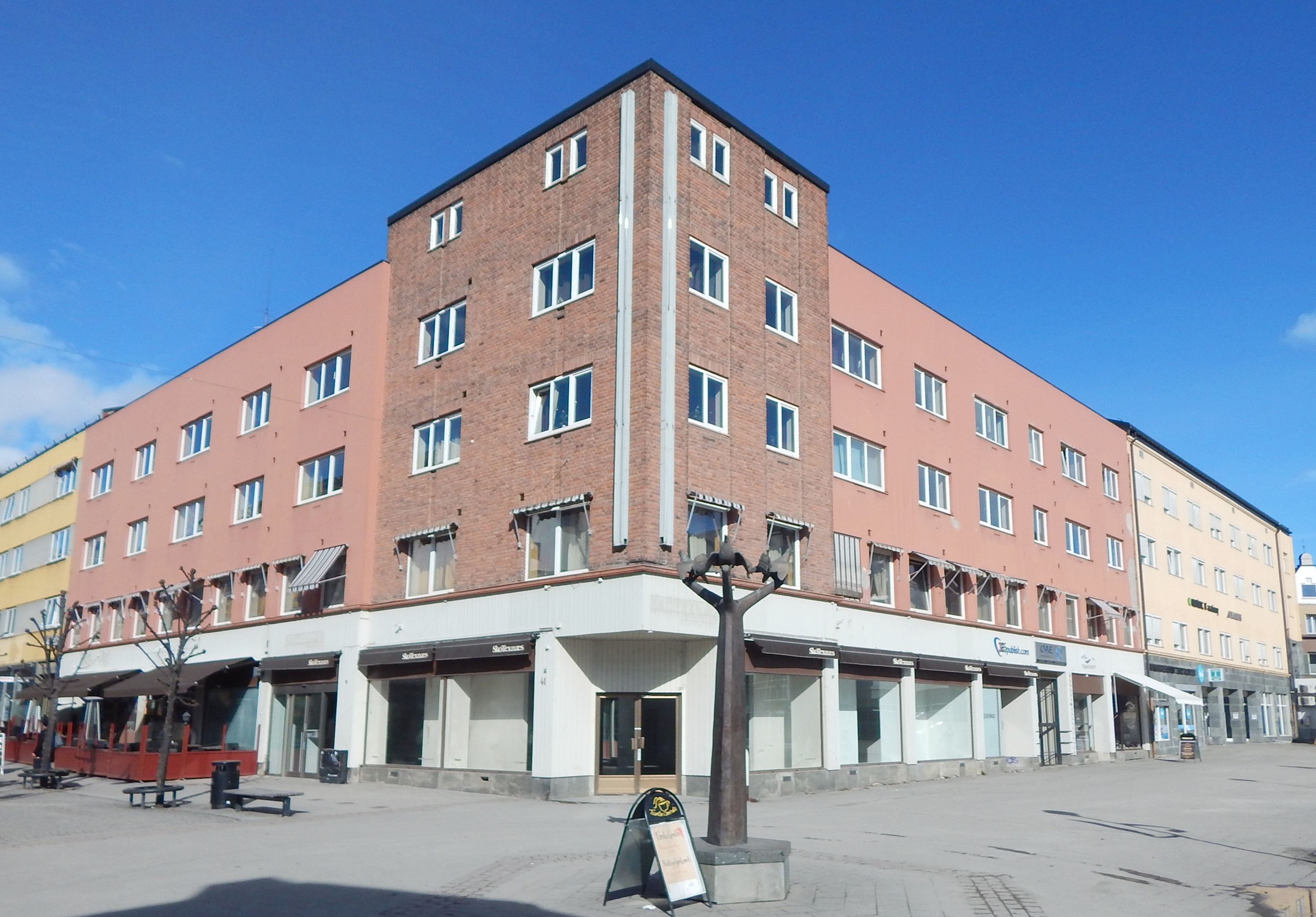 Torggata 41 ved Østre torg. Oppført 1935–36 for J. Steen ved arkitektene Finn Poppe og Rolf Prag.